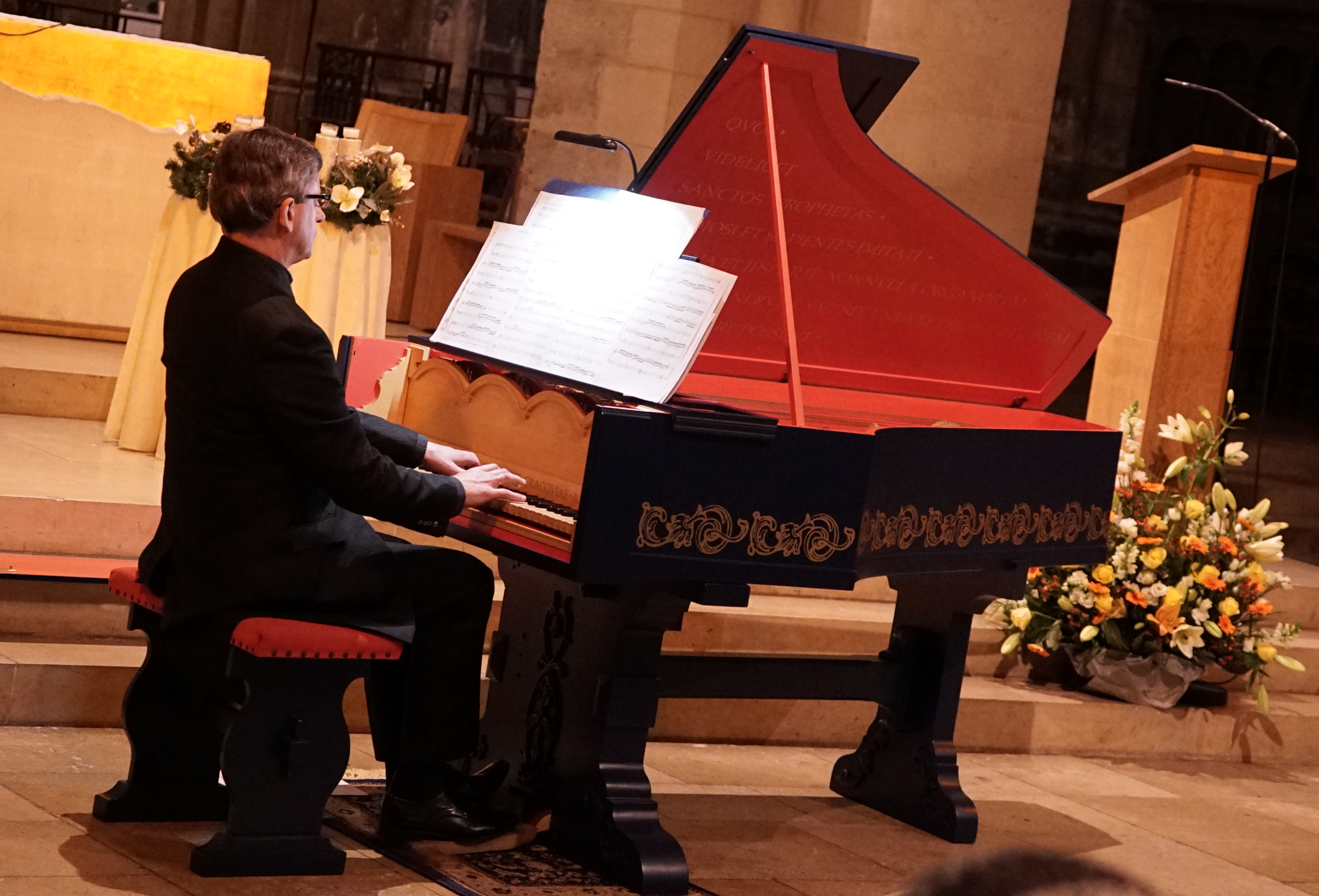 lors d'un concert à Reims.